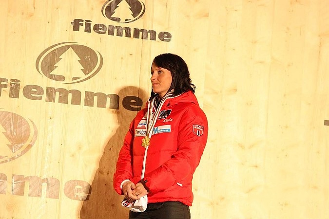 Dekoracja medalowa biegu indywidualnego kobiet na 30 km techniką klasyczną